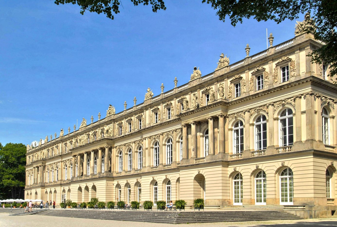 Herrenchiemsee, neues Schloss / new castle